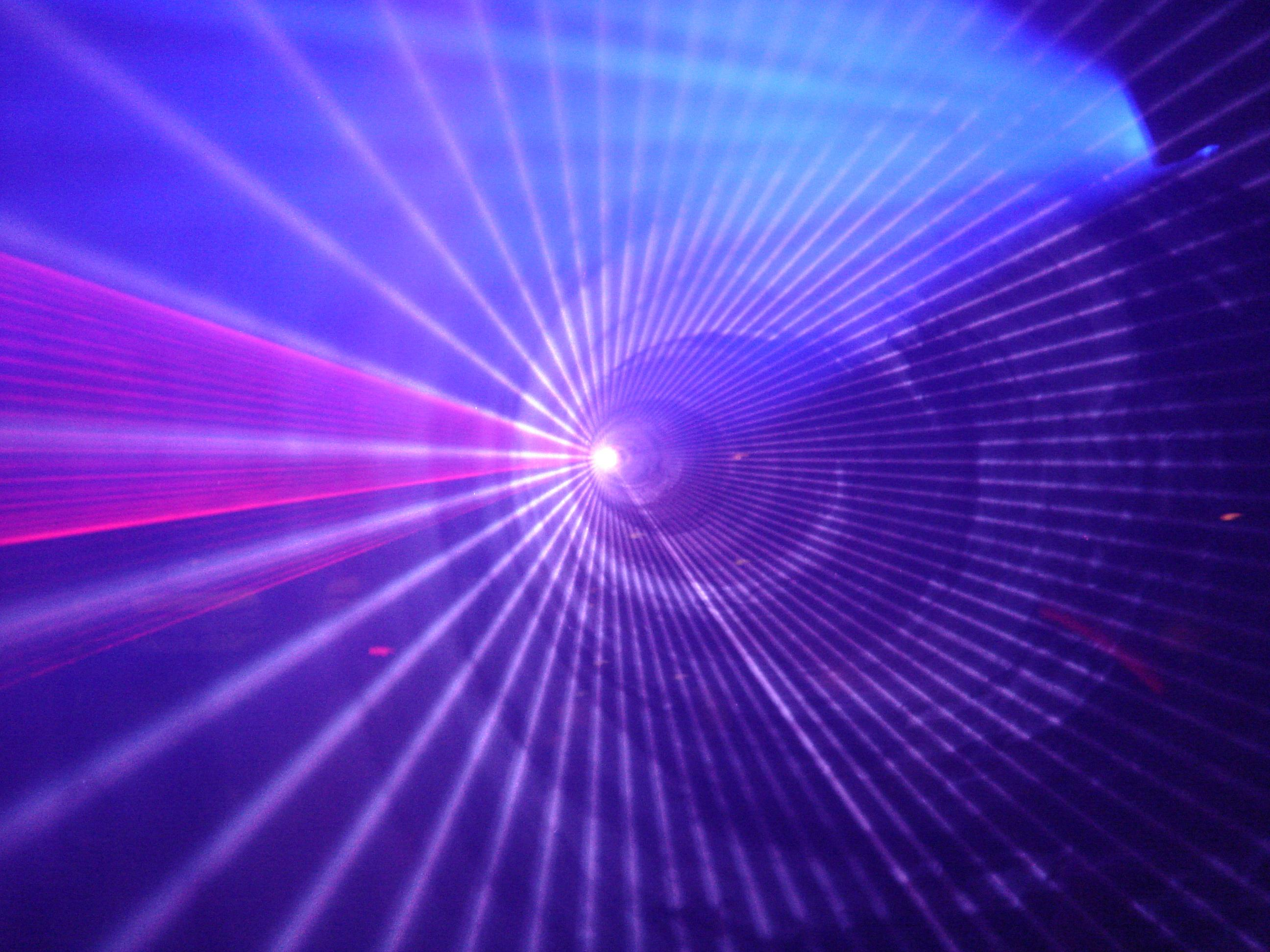 Lightshow im Aura Ibbenbüren.